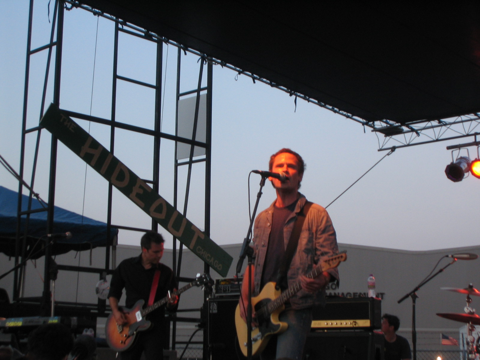 Girls Against Boys en 2006.